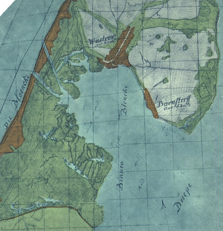 Karte von Permin und dem südlichen Fischland